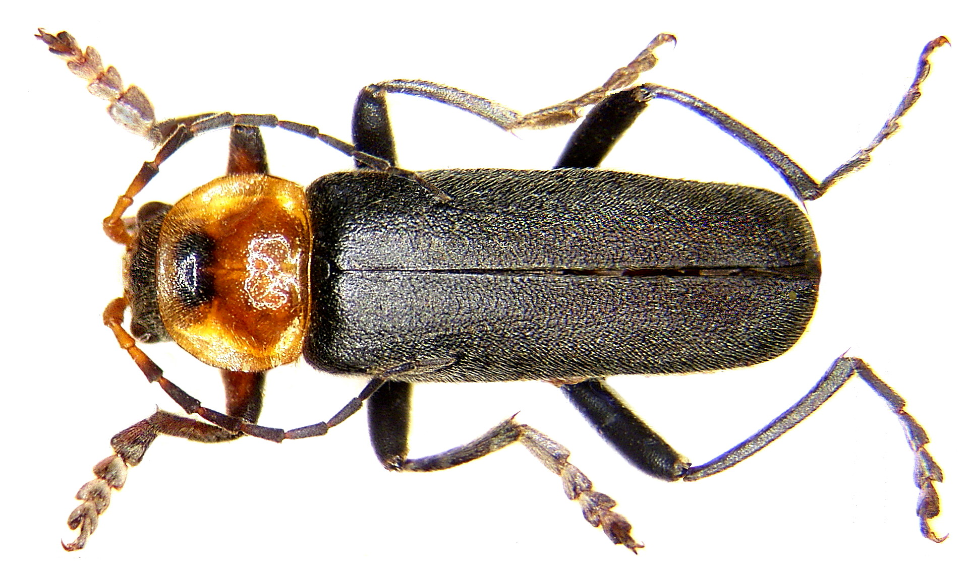 Familie: Cantharidae Grösse: 11-15 mm Verbreitung: Europa Fundort: Germania, Bayern, Oberfranken, Kulmbach leg.det. U.Schmidt, 1972 Foto: U.Schmidt, 2005